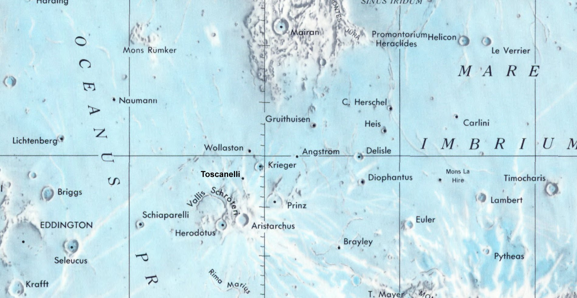 Cráter lunar Toscanelli. Localización. (Lunar Chart LPC1. Second Edition)